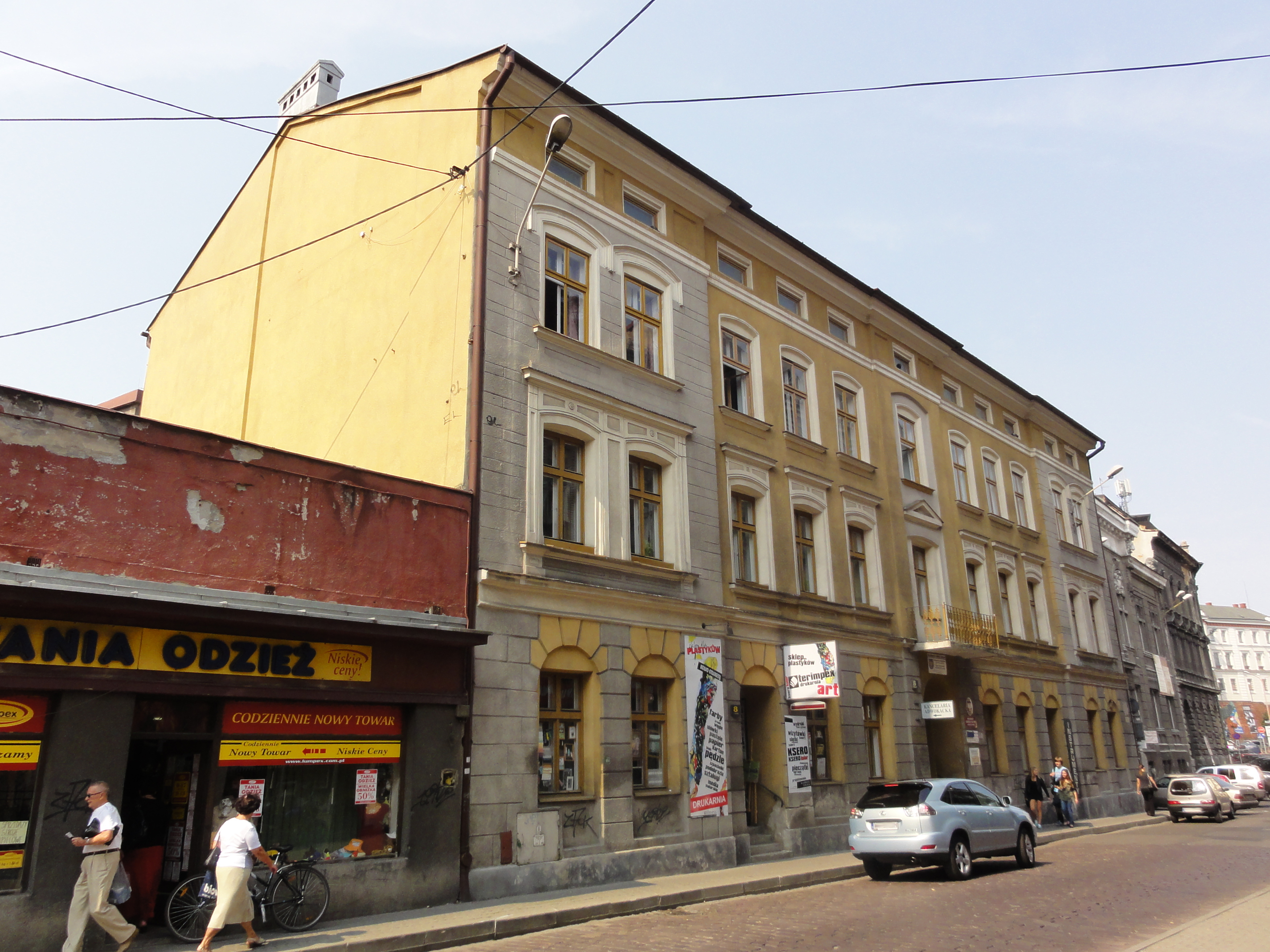 Bielsko-Biała, ul. 1 Maja 8 - Regionalny Ośrodek Kultury